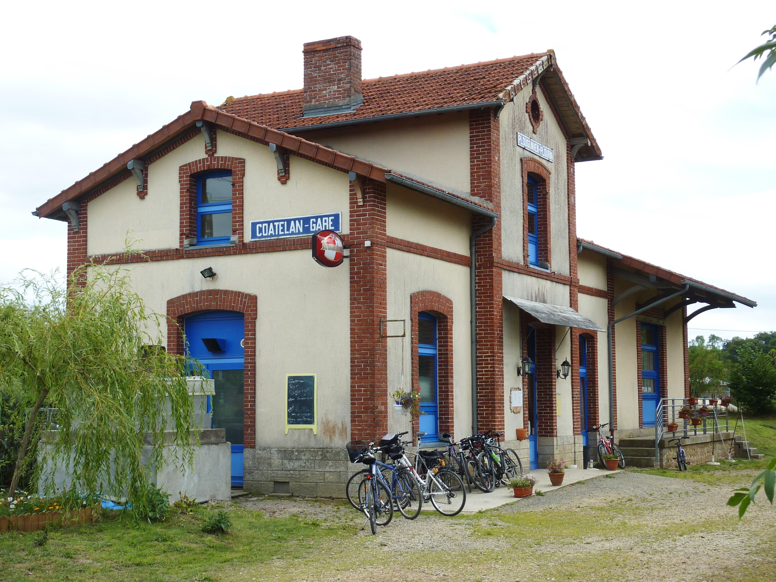 Plougonven-Plourin-les-Morlaix: l'ancienne gare de Coatelan, désormais café de la gare (fermé en 2014)